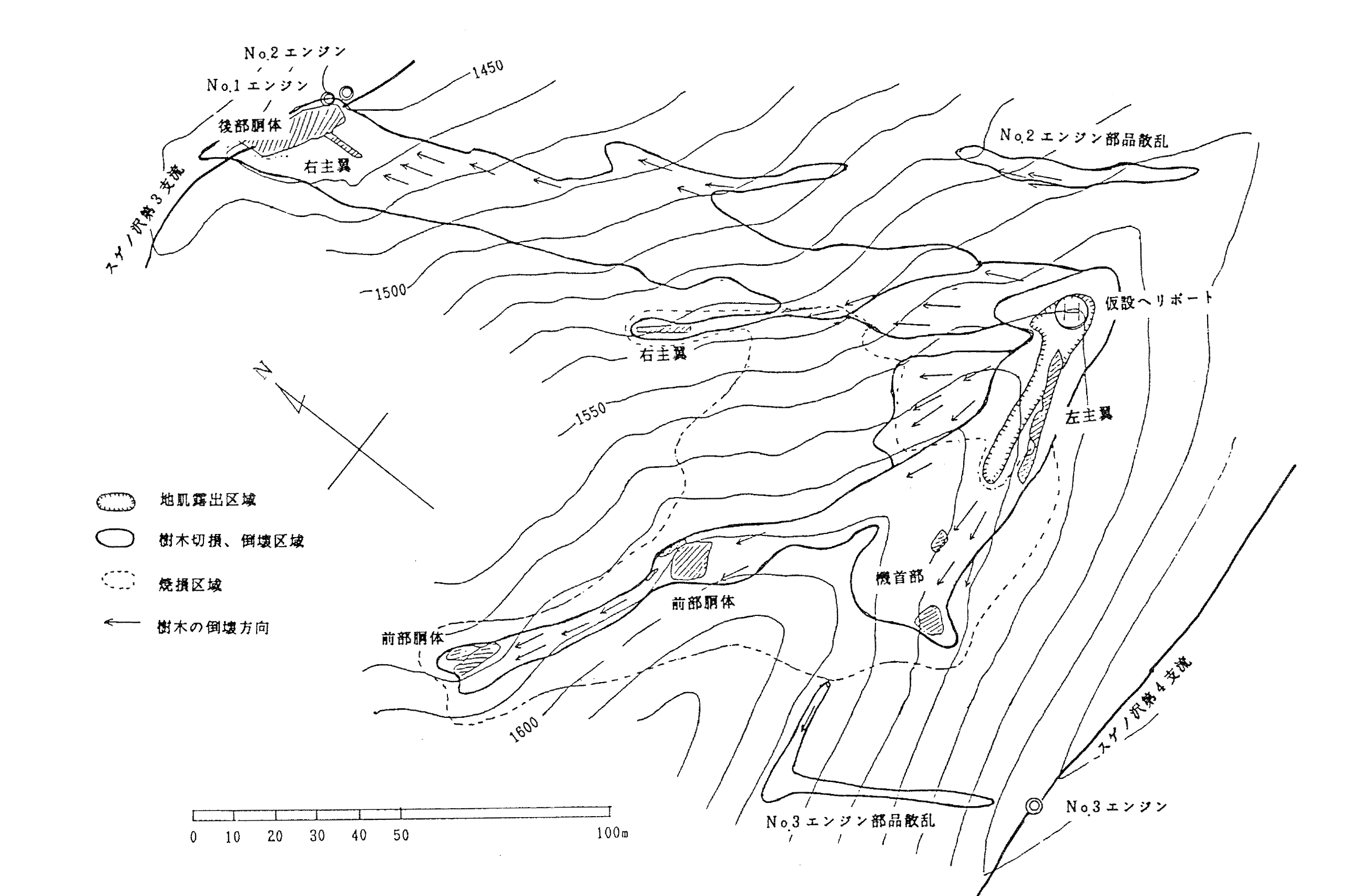 日本航空123便の事故現場概要図 JTSB公表の報告書より（62-2-JA8119 日本航空(株)所属 ボーイング 747SR-100型 JA8119 群馬県多野郡上野村）